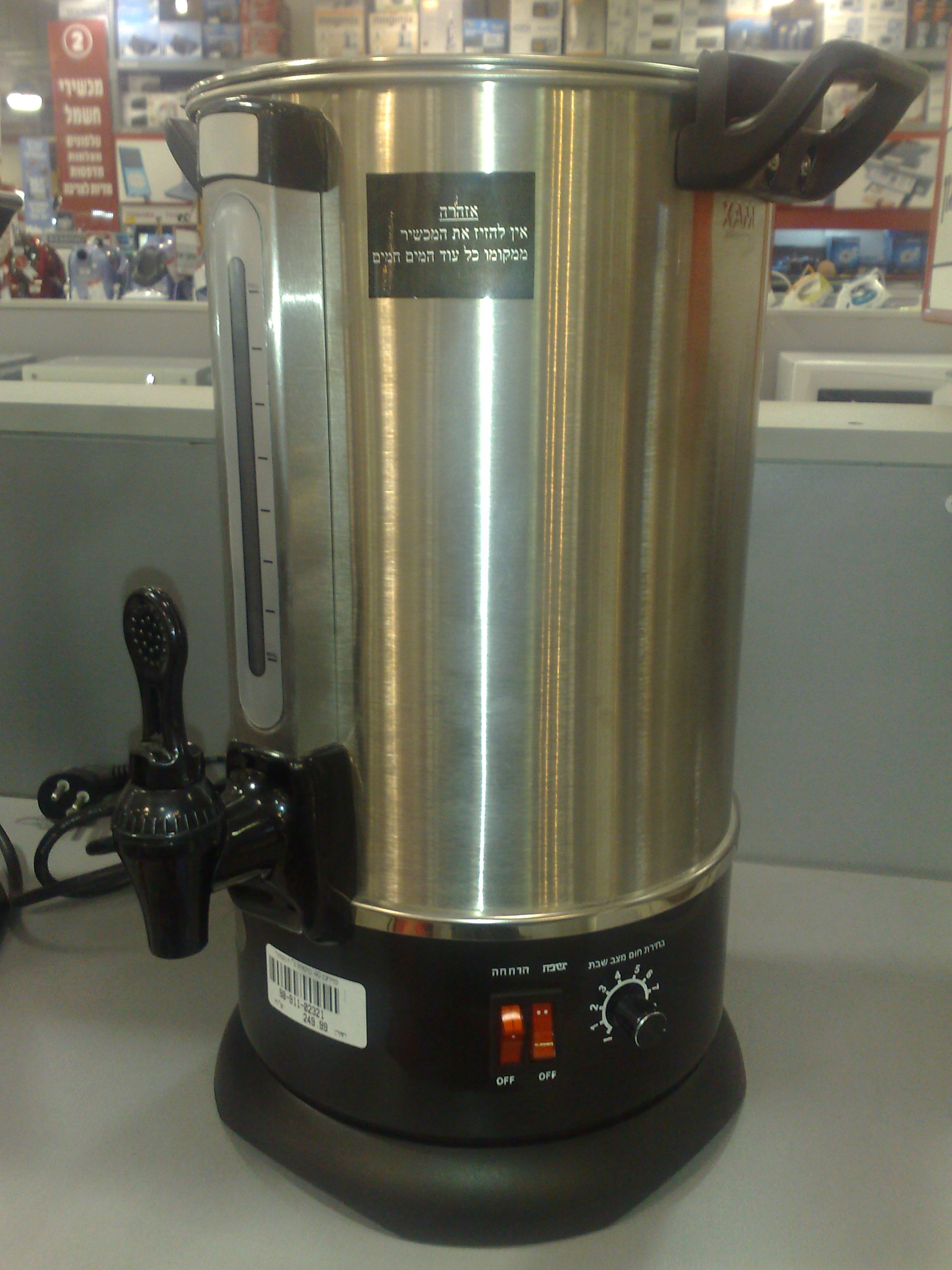 מיחם